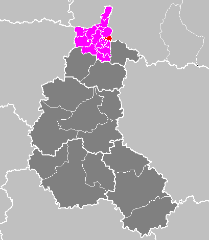 Maps of arrondissements and cantons of France: Arrondissement de Charleville-Mézières - Canton de Nouzonville.PNG